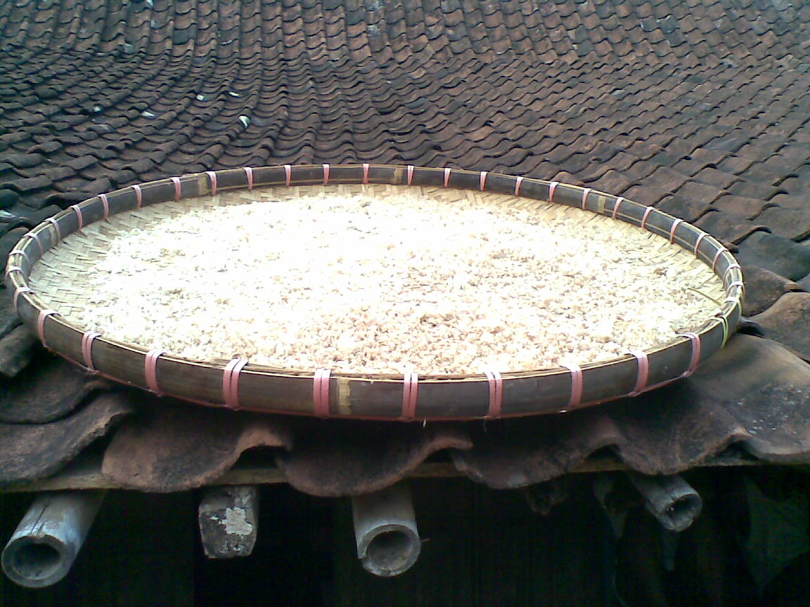 wadhah